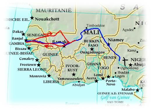 De routes van ontdekkingsreiziger Mungo Park. Kaart: CIA World Factbook, vertaling: Danielm (zie :Afbeelding:Kaart Afrika.jpg), toevoeging routes: Andre Engels. Bij dezen publiek domein.